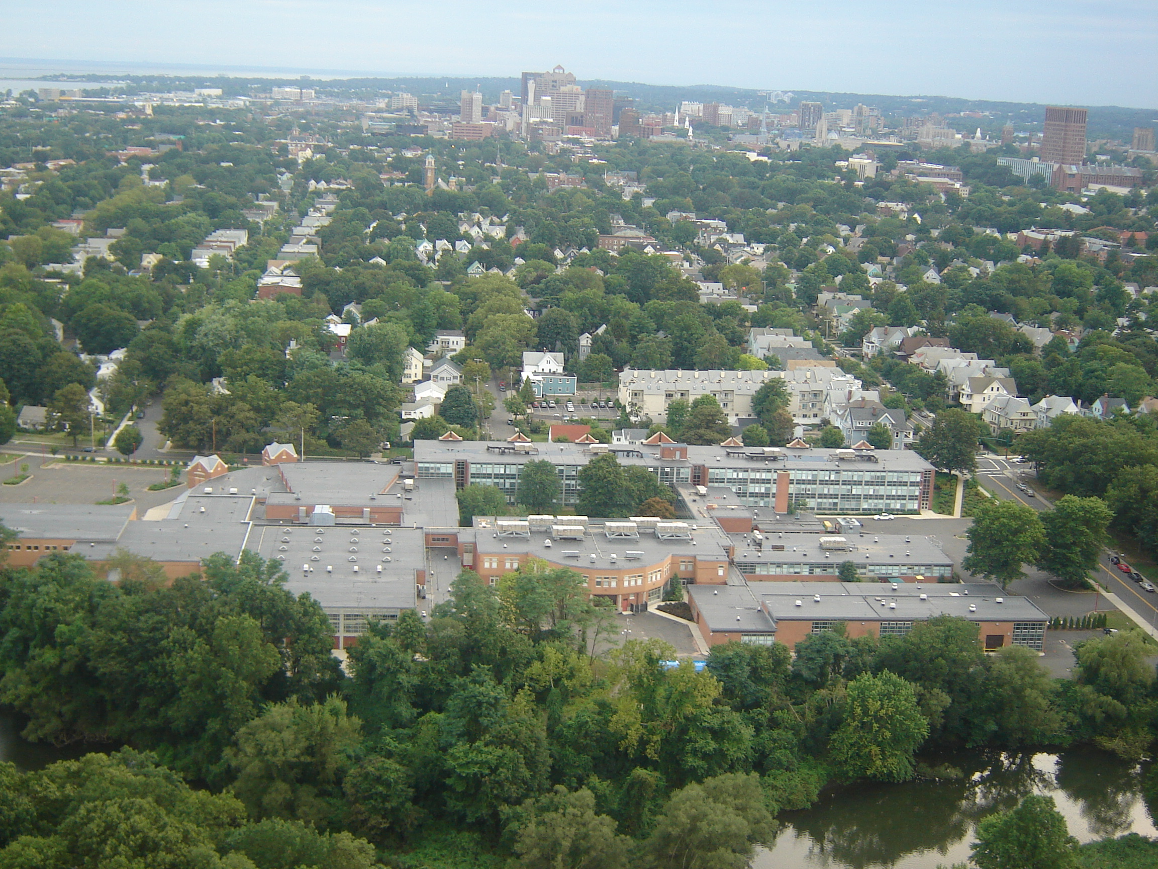 New Haven'in (ABD/Connecticut) kuşbakişi fotografi. Tarafımdan çekilmiştir.